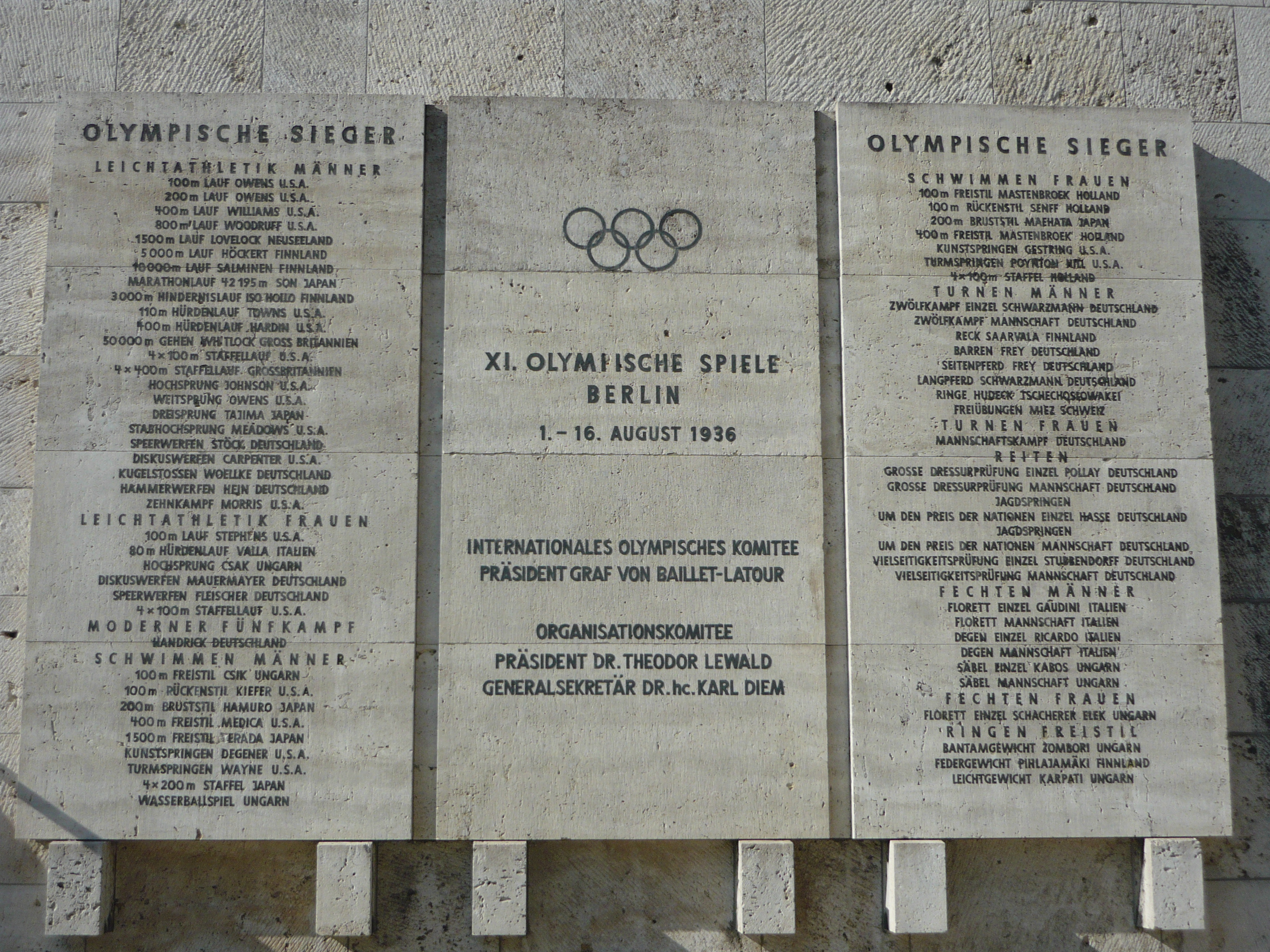 Résultats des différentes épreuves des Jeux Olympiques de Berlin de 1936 affichés dans le stade olympique de Berlin - 1